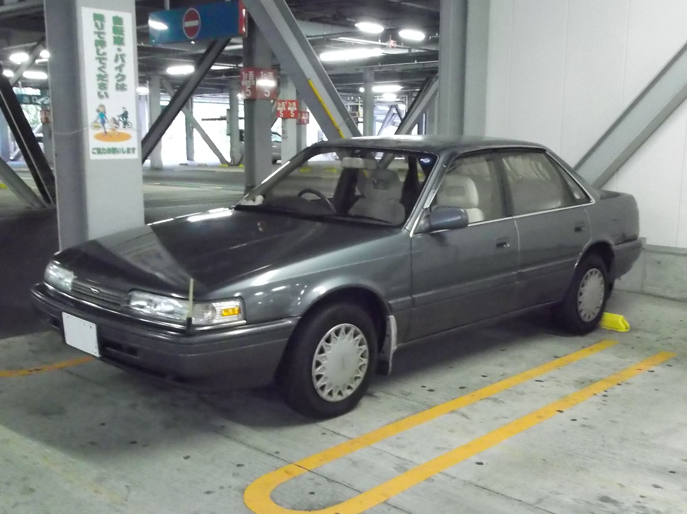 5代目マツダカペラ